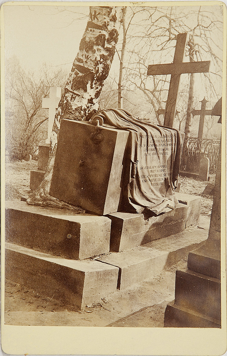 Fotografie aus Hannover, um 1880, aus einem Konvolut, rückseitig teilweise gestempelt mit Carl G. Frietsch (Besitzernachweis ?) und mit einem offensichtlich älteren Stempel von Wilhelm Mendelsohn, "Americanischer Bazar, Hannover, Georgstraße 11 und Frankfurt am Main, Schillerplatz 6 und Zeil 29, Reichhaltiges Lager von Photographien sämmtlicher größerer Städte Deutschlands sowie von modernen und classischen Bildern; große Auswahl feiner Galanterie und Luxuswaaren, english spoken"